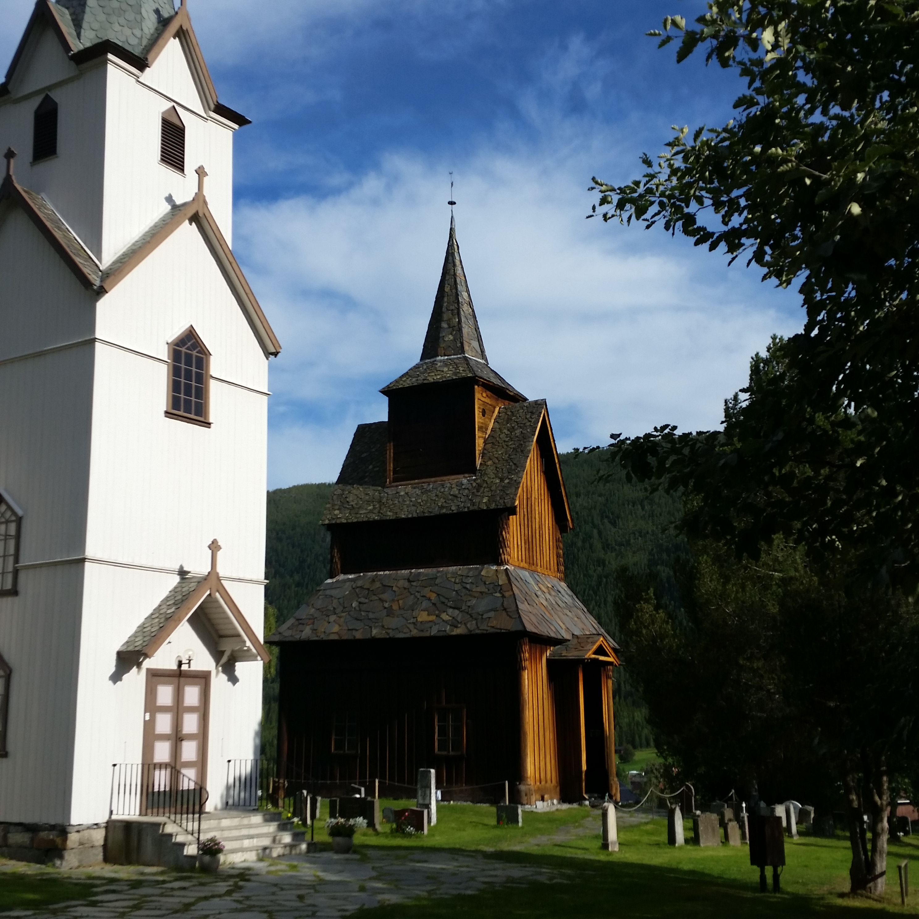 Torpo stavkyrkje